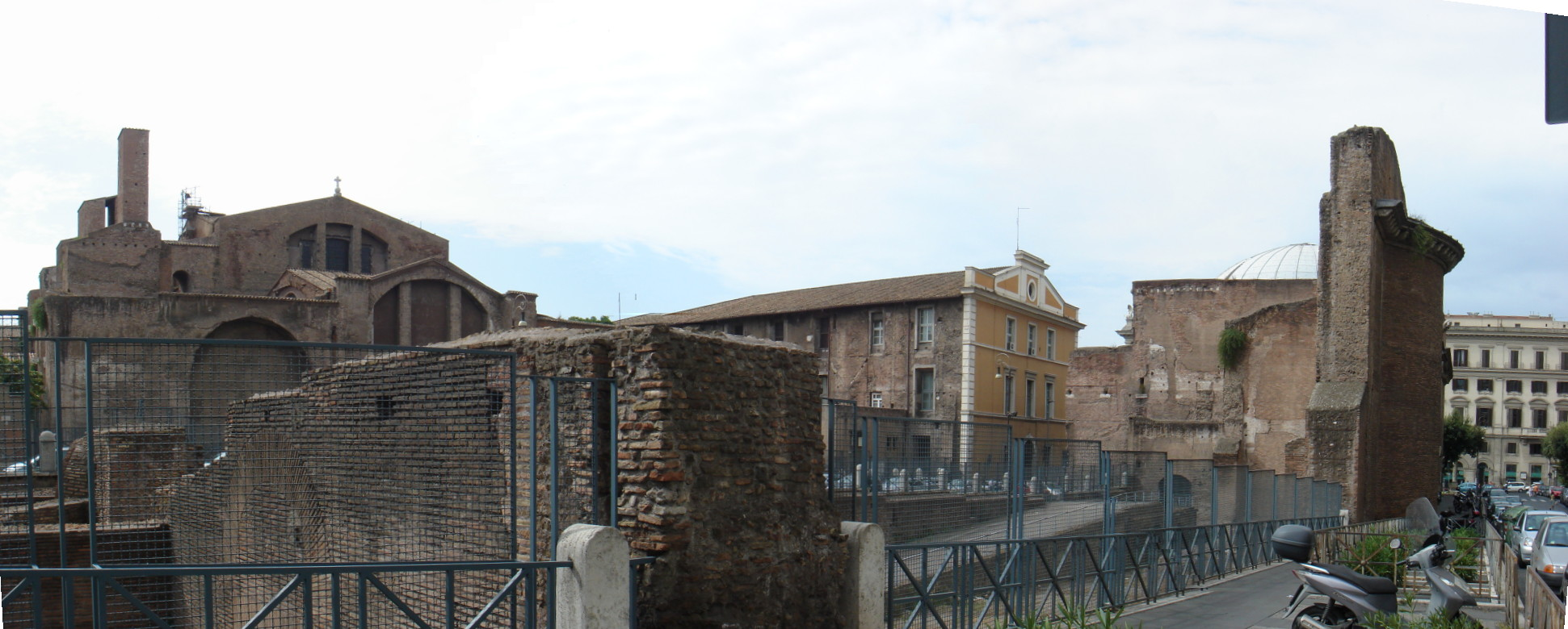 Roma, Terme di Diocleziano: vista da via Parigi